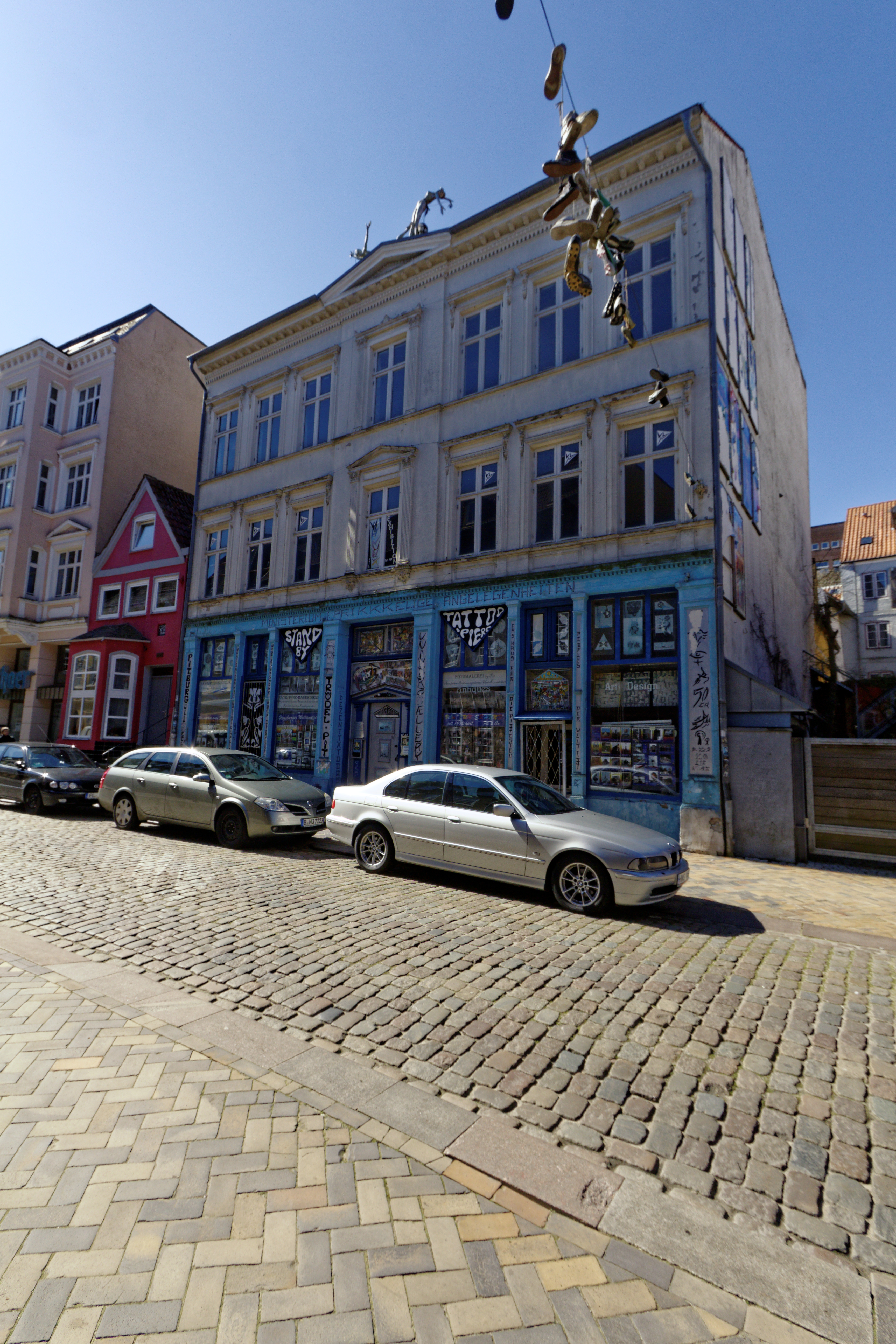 Flensburg, Norderstr. 107-109